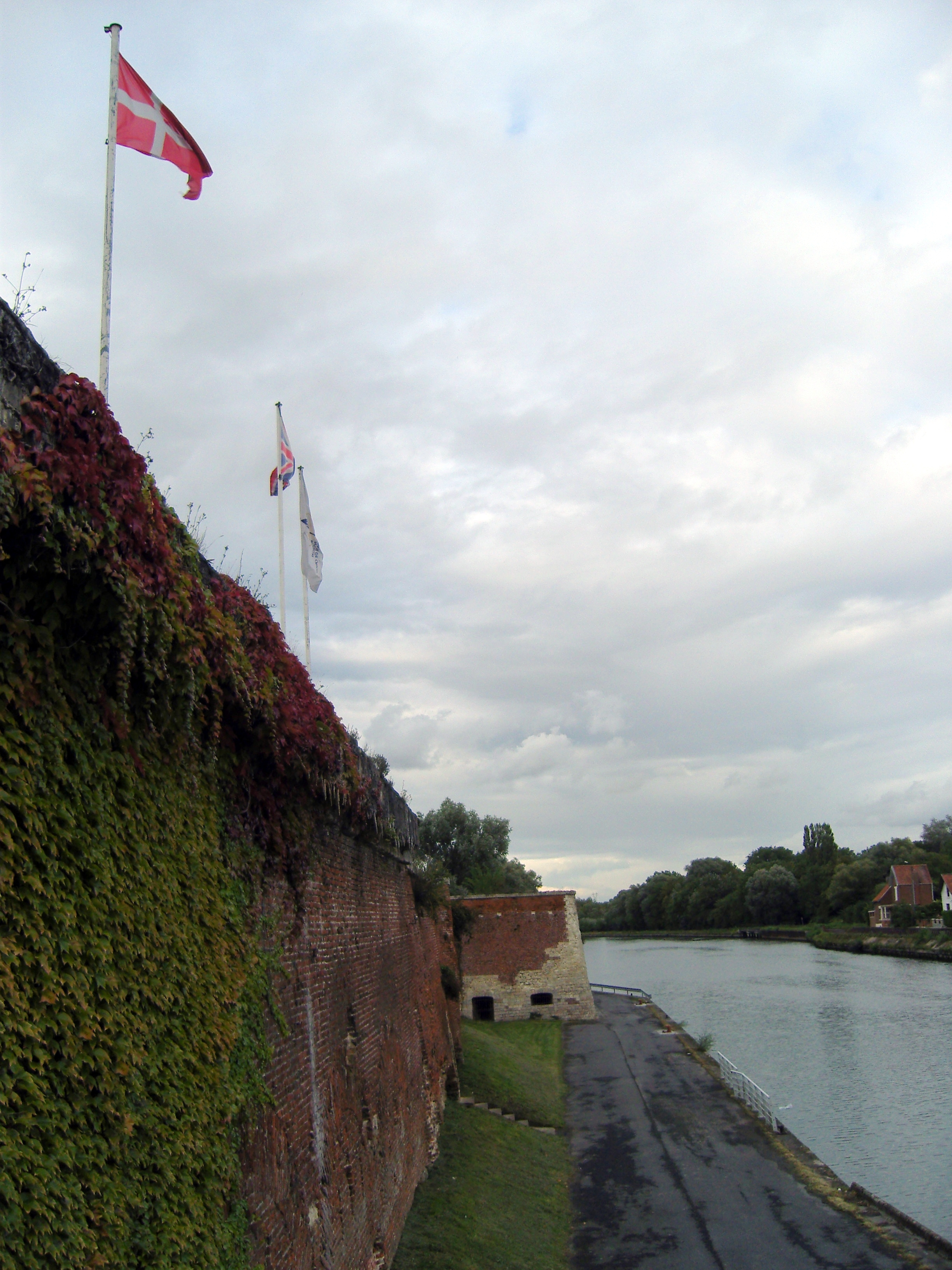 vestiges des fortifications :la courtine sud et au fond le bastion des forges